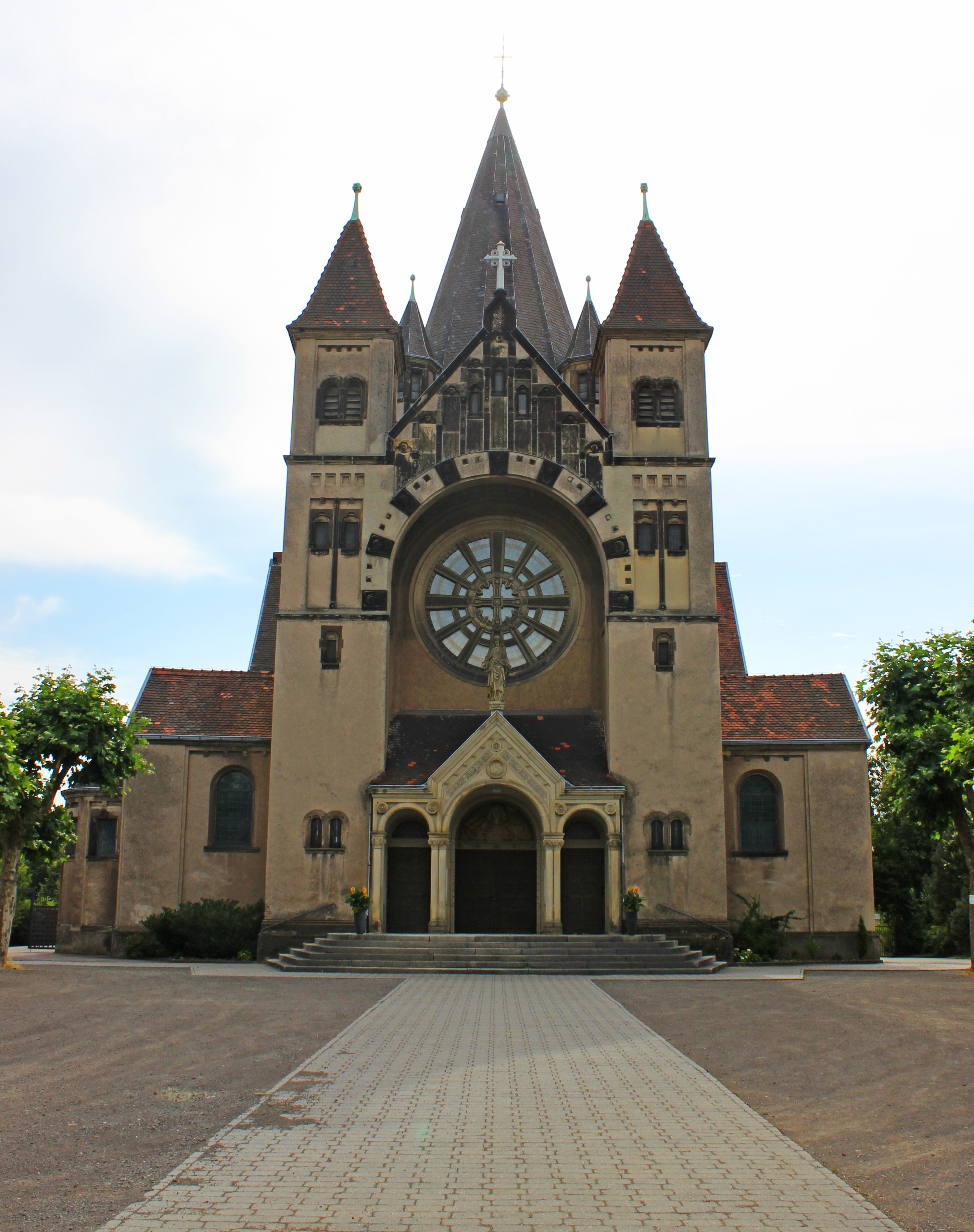 Die Herz-Jesu-Kirche in Burbach, einem Stadtteil der saarländischen Landeshauptstadt Saarbrücken